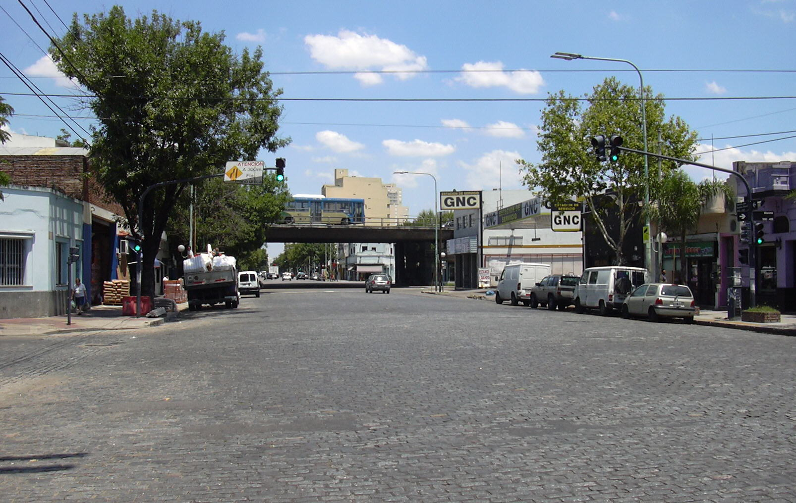 Vista desde el este de la Av.Juan Bautista Alberdi al 4500 en su cruce con calle Moreto (Villa Luro)